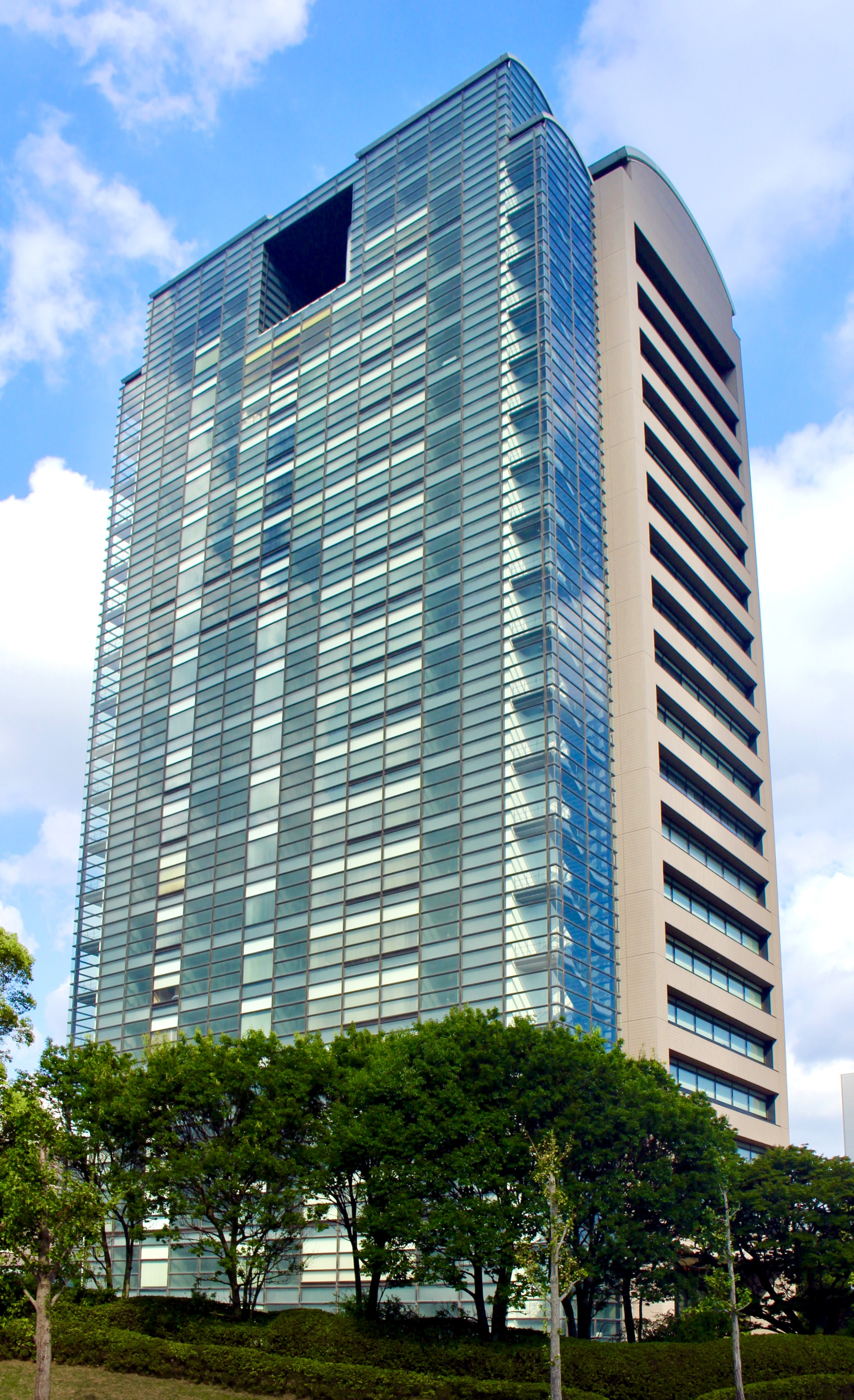 Mitsui Sumitomo Chiba New Town Center